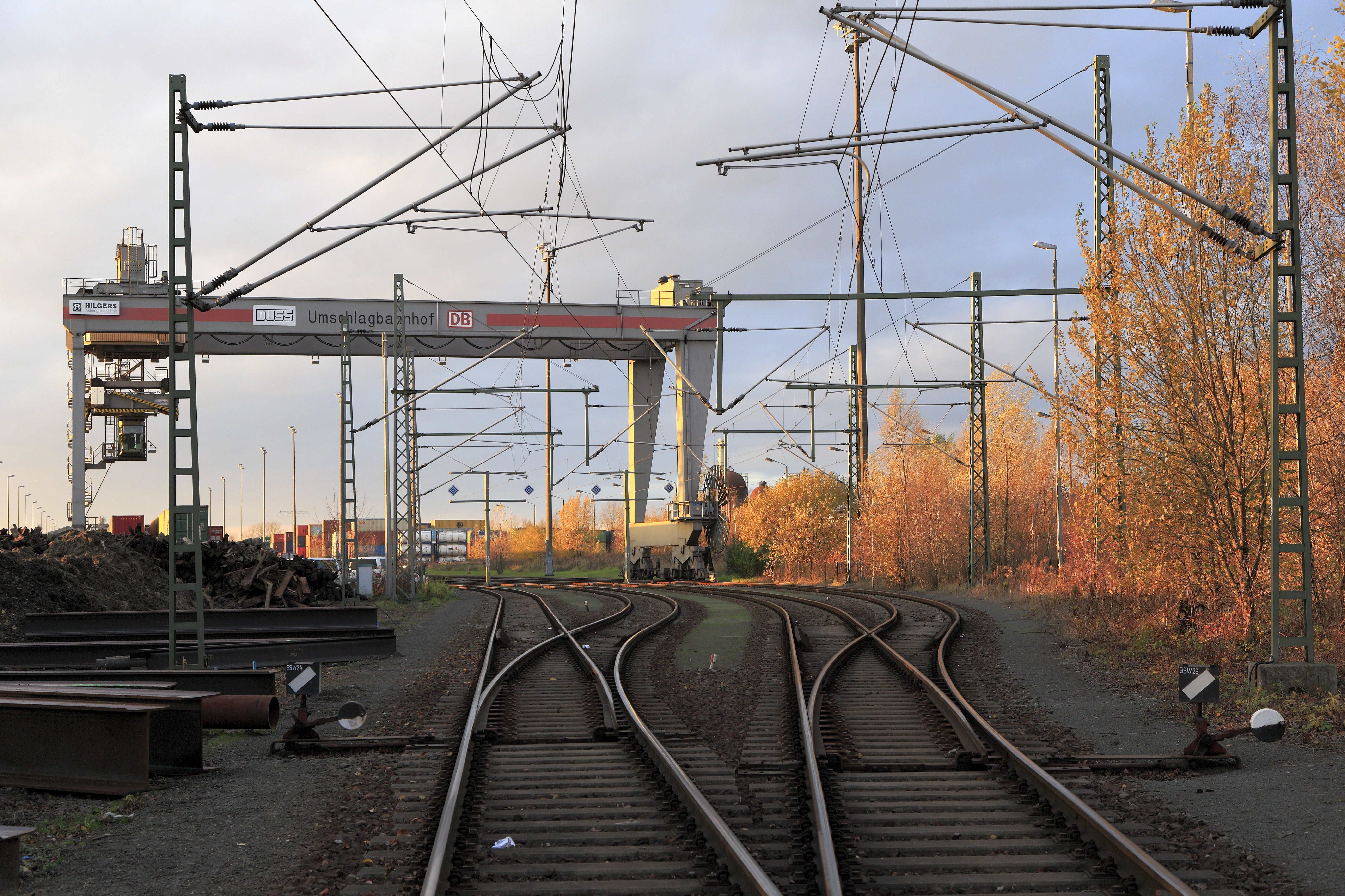 Verteilerweichen für die derzeit vier Umschlagleise. Die Fahrleitung endet im Kranbahnbereich, es ist weitgehend möglich, die Wagenzüge ohne zusätzliche fahrdrahtunabhängige Rangierlokomotive zu bewegen.